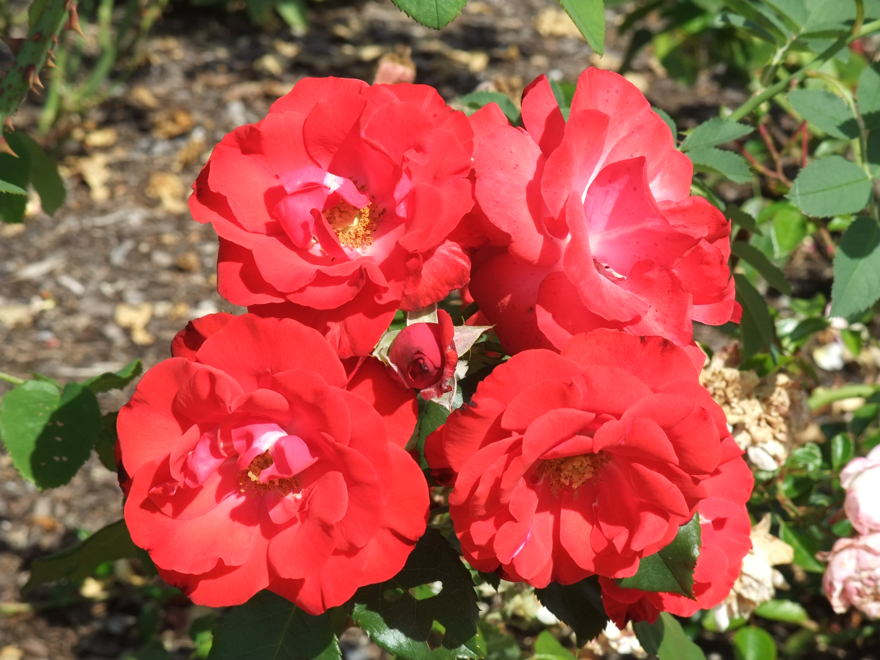 Eine als Leonardo da Vinci Rose verkaufe Rose. Fotographiert im eigenem Garten. Vermutlich handelt es sich aber nicht um diese Sorte